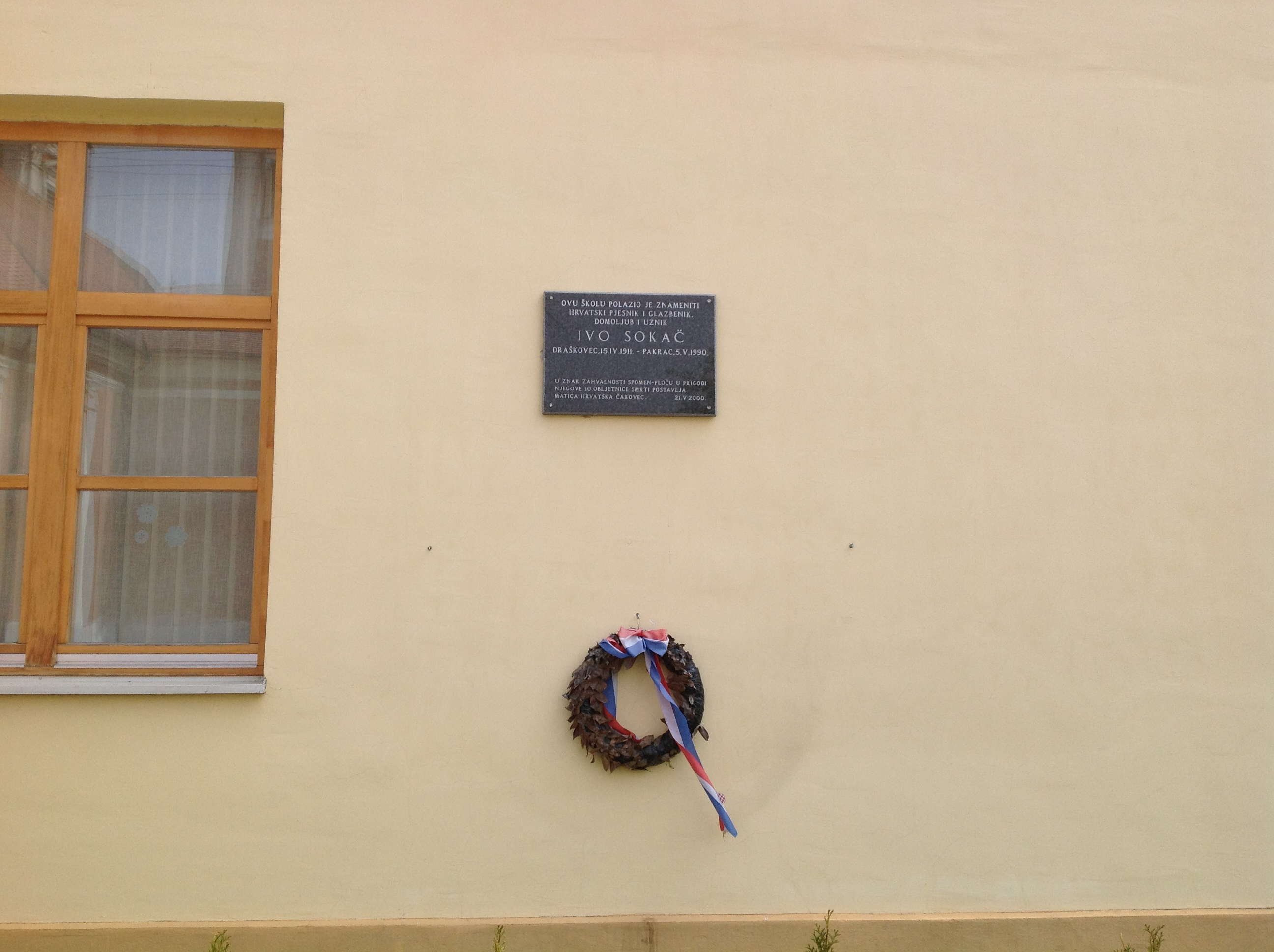 Ivo Sokac emléktáblája